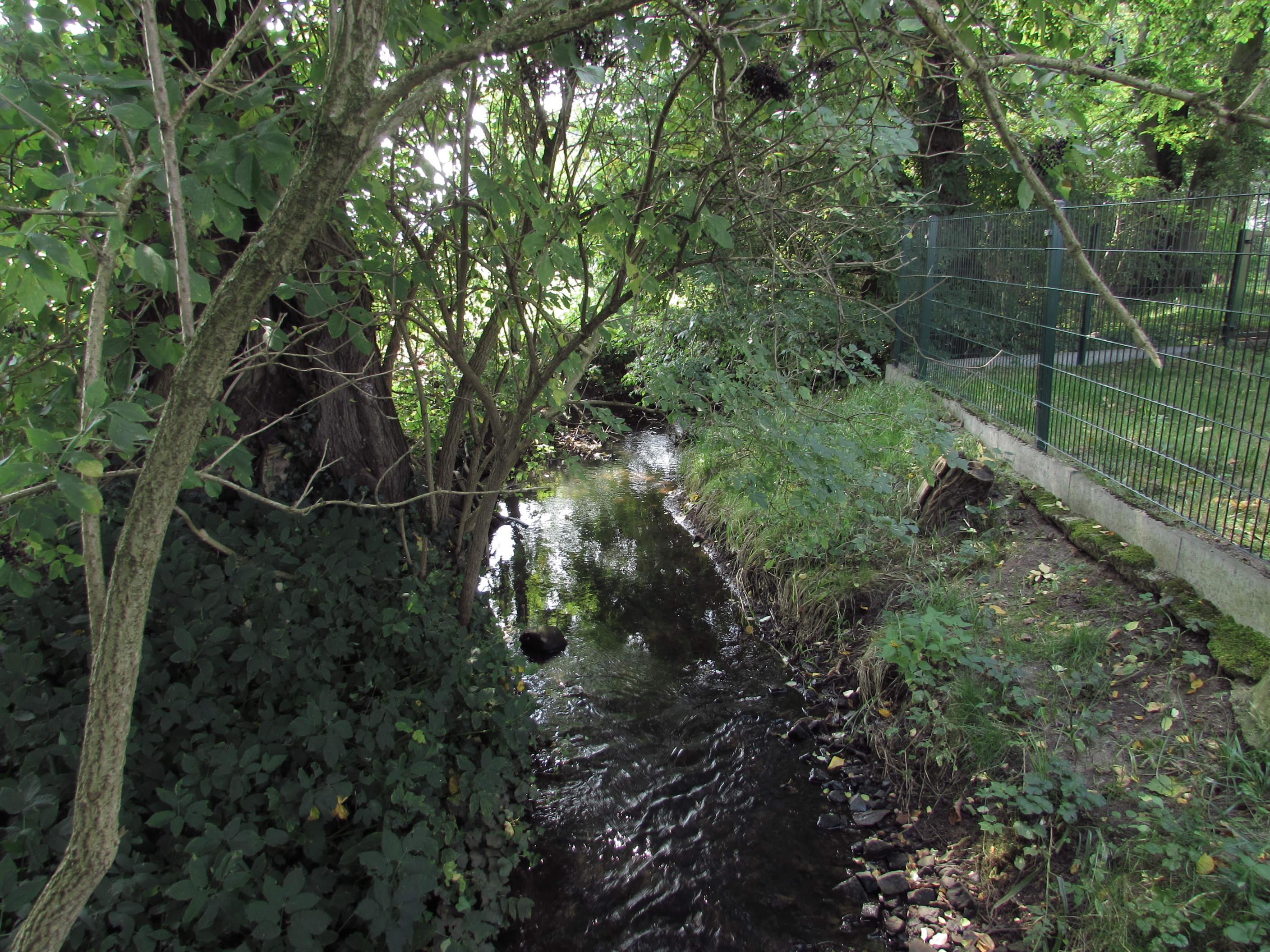 strynzelbach bei bücknitz